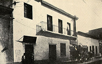 Fachada de la jabonería, demolida en 1932. Estaba en la calle México al 1000 (actual Avenida 9 de Julio).